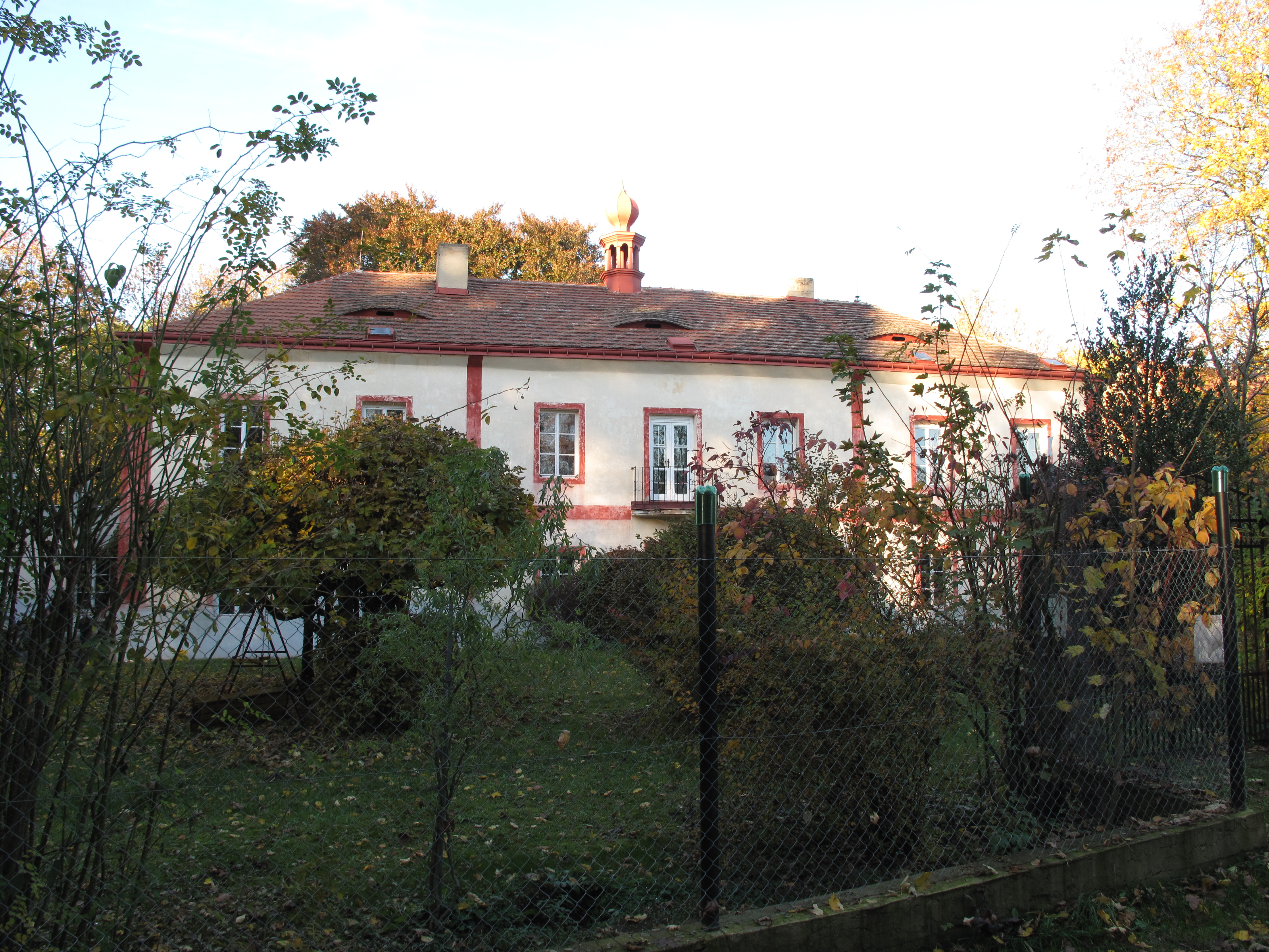 Zámek v Dobrohošti. Okres Příbram, Česká republika.